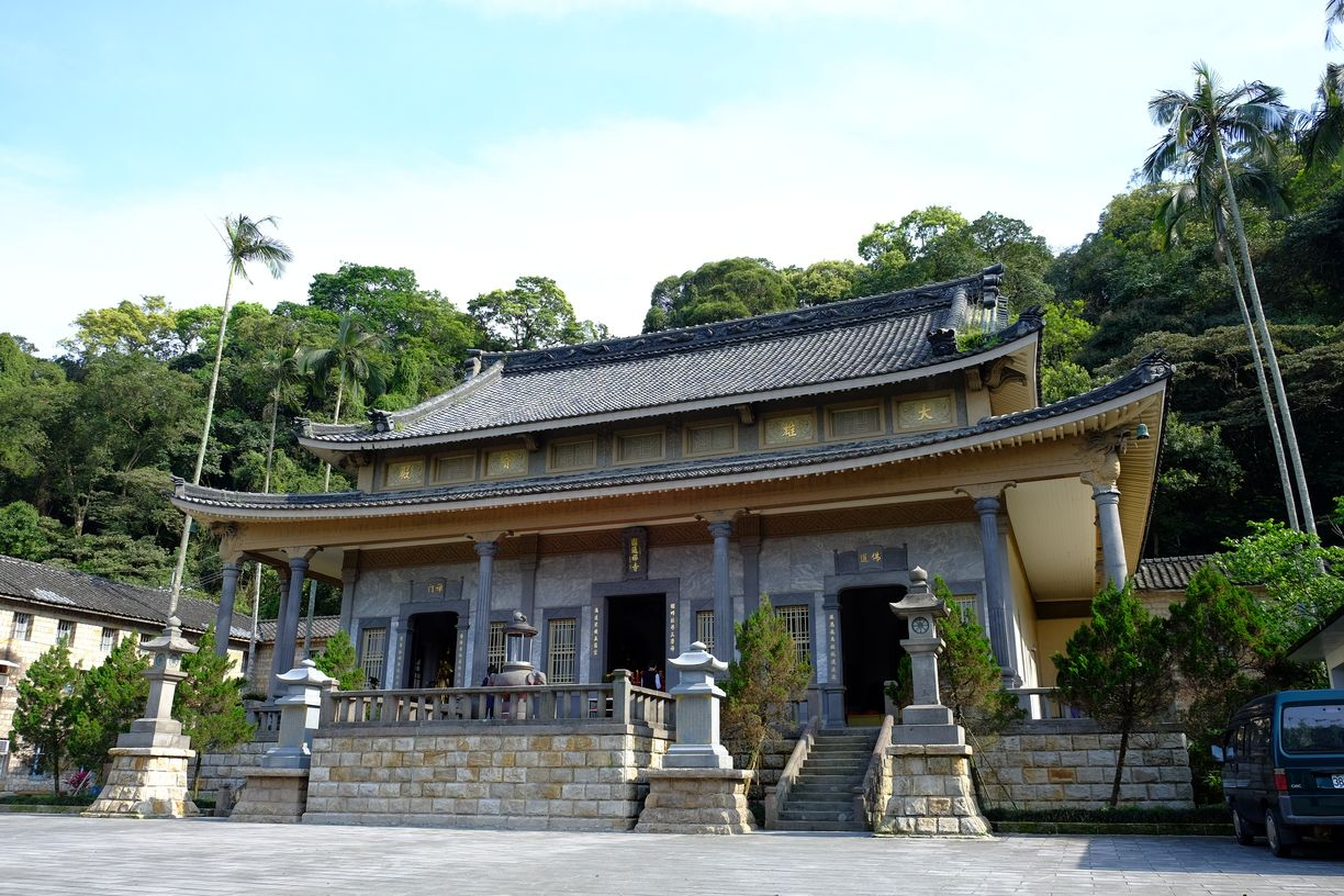 台灣新北市圓通禪寺